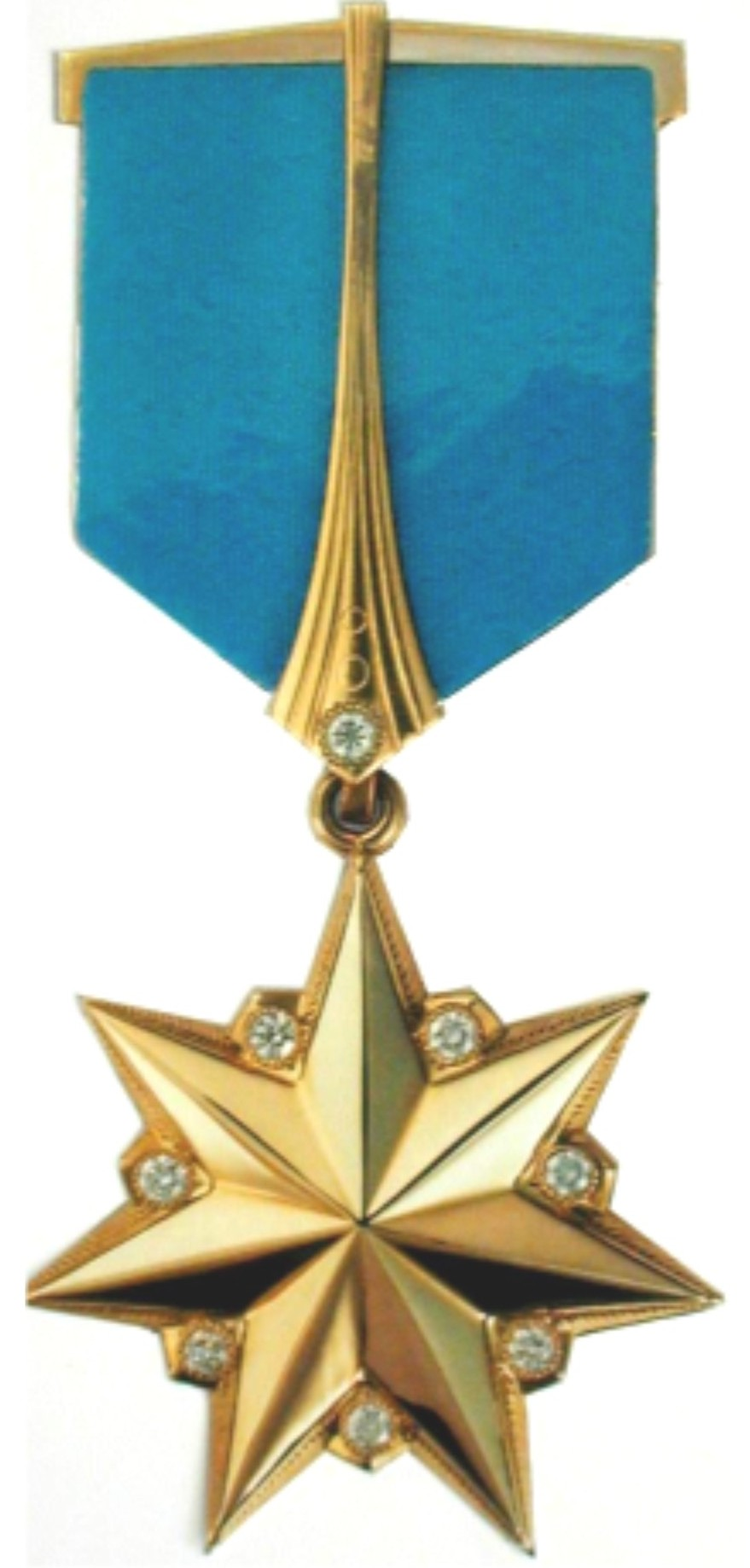 Государственная награда Республики Казахстан - Золотая звезда к званию "Народный герой"